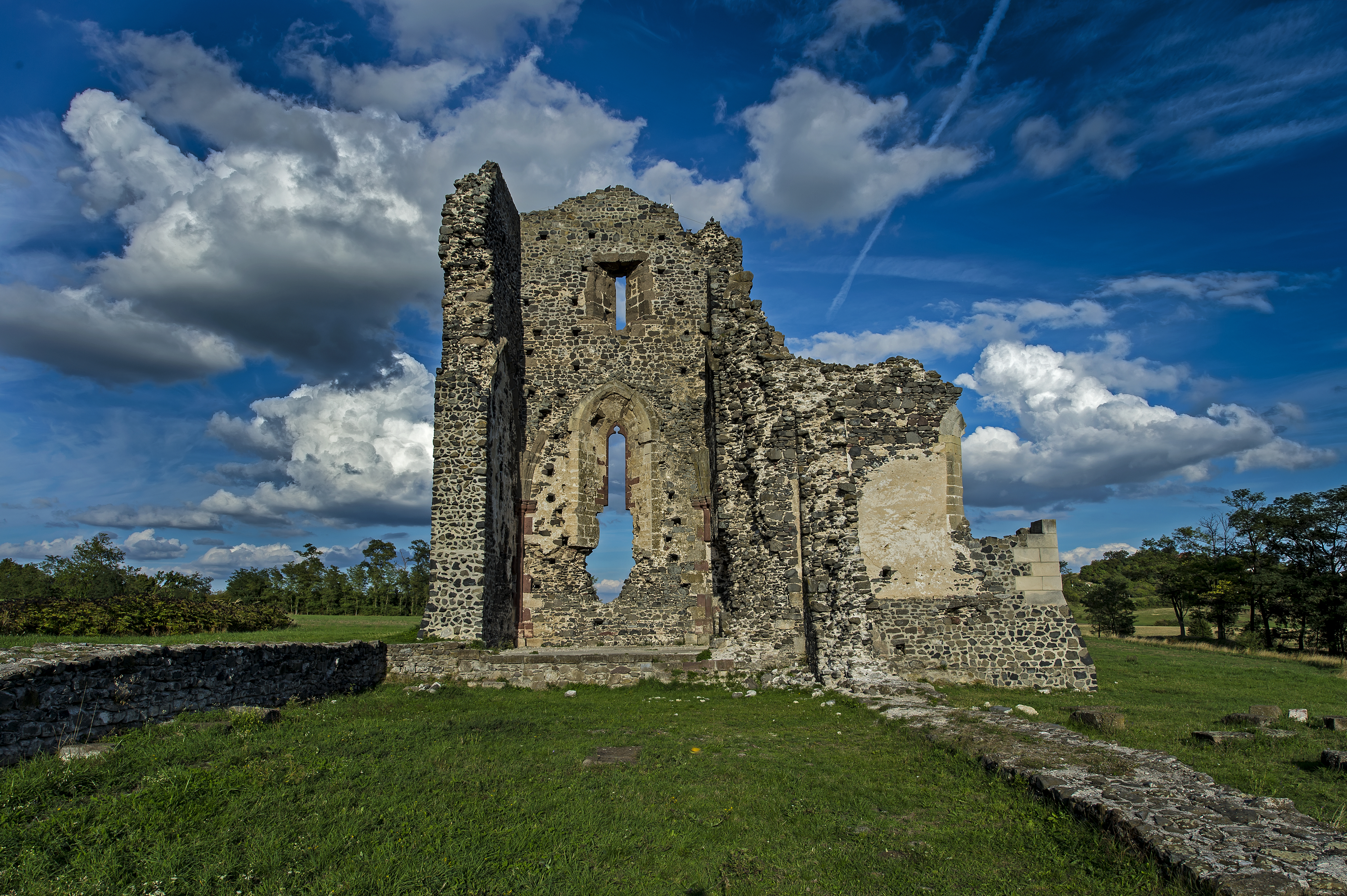 Taliándörögd, templomrom This is a photo of a monument in Hungary. Identifier: 10448